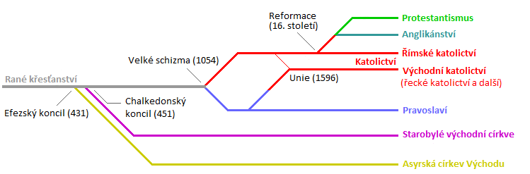 Časová osa křesťanství, jednotlivá dělení na jednotlivé církevní směry až po současnost.